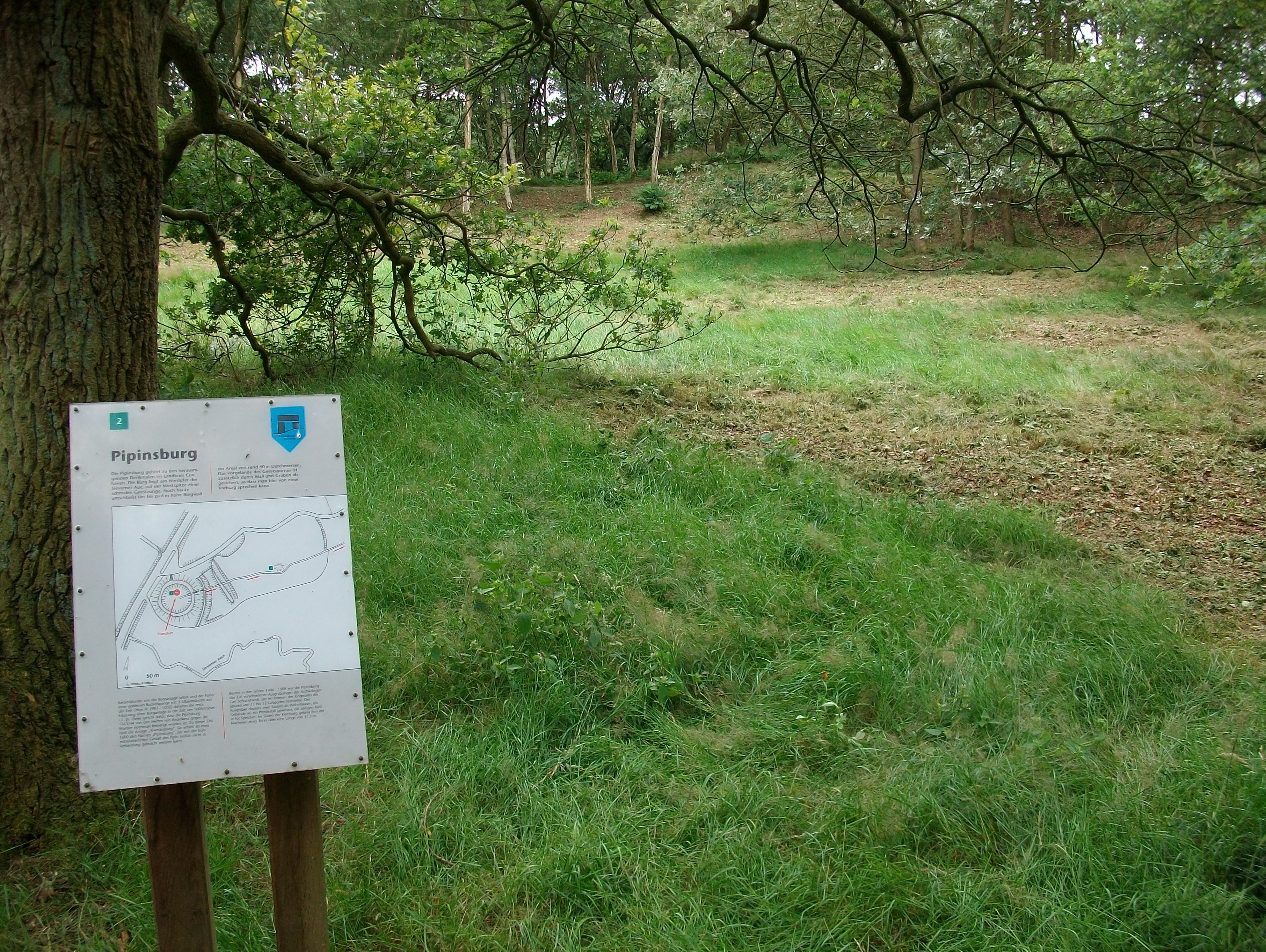 Pipinsburg in Sievern im Landkreis Cuxhaven (Germany)